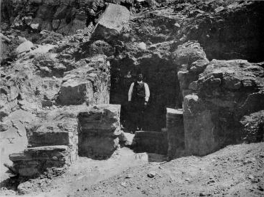 Ausgrabungen in Mochlos im Jahr 1908 durch Richard B. Seager, Kreta, Griechenland